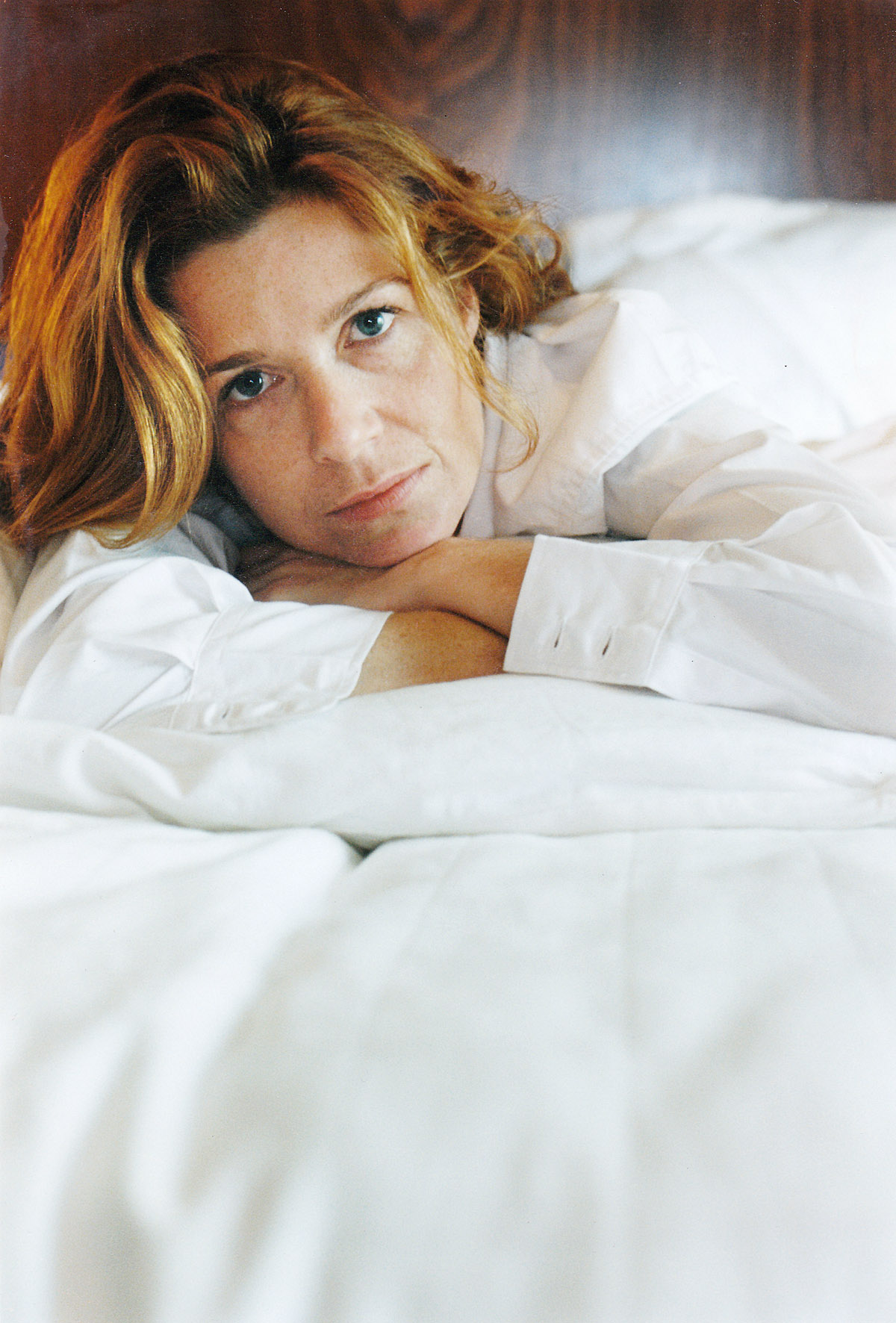 Barbara Sarafian, Belgische actrice